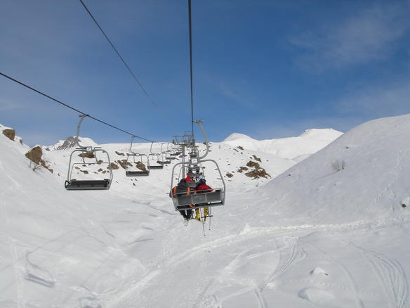 Winter in Bakuriani, Georgia.